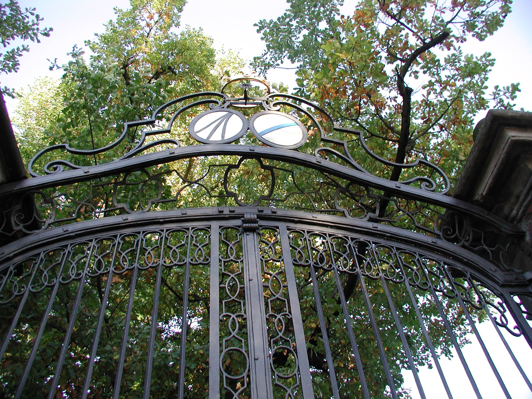 Bornheim-Rösberg, Burgeingang